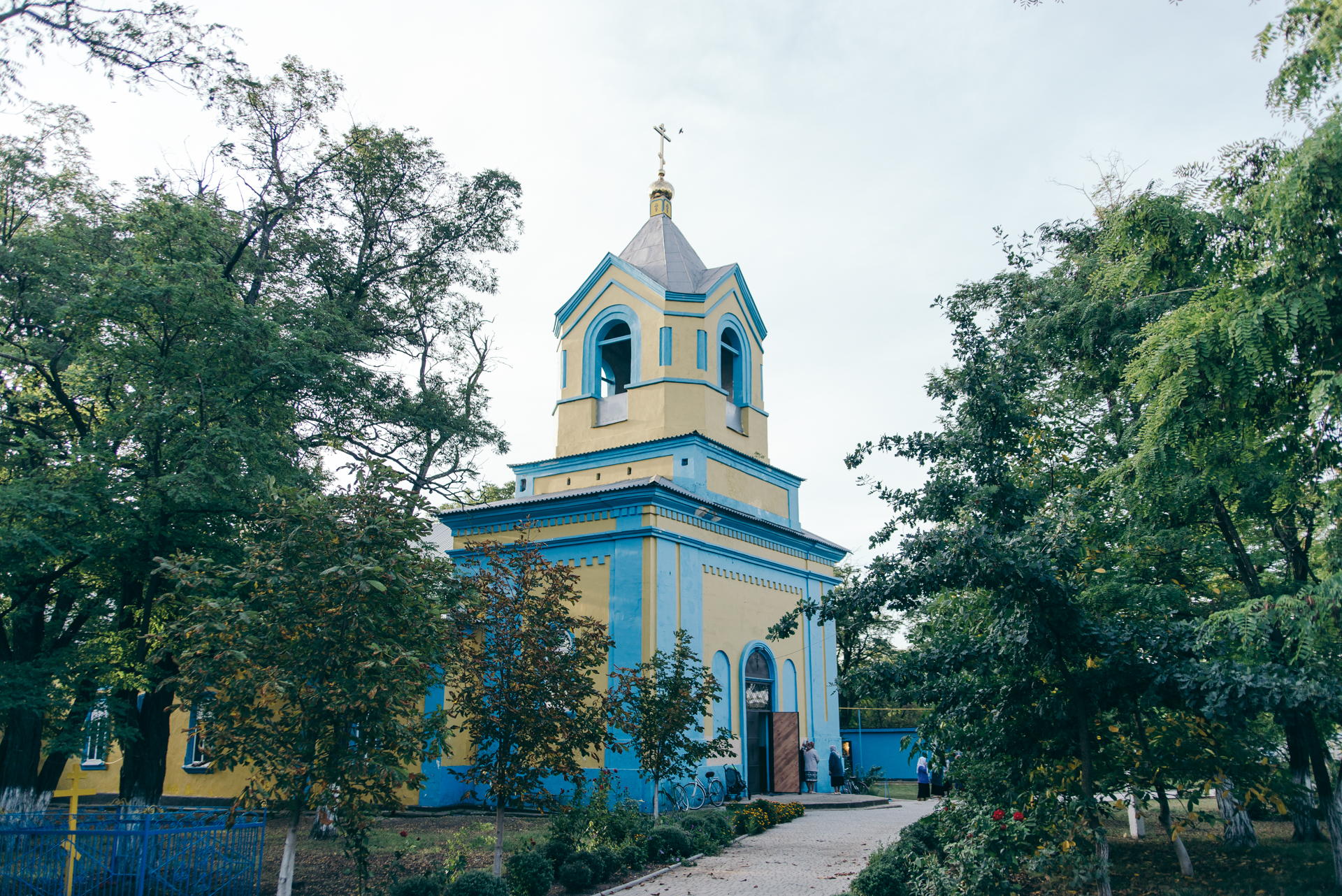 Храм Воздвиження Чесного і животворящого Хреста Господнього в с.Велике Плоске